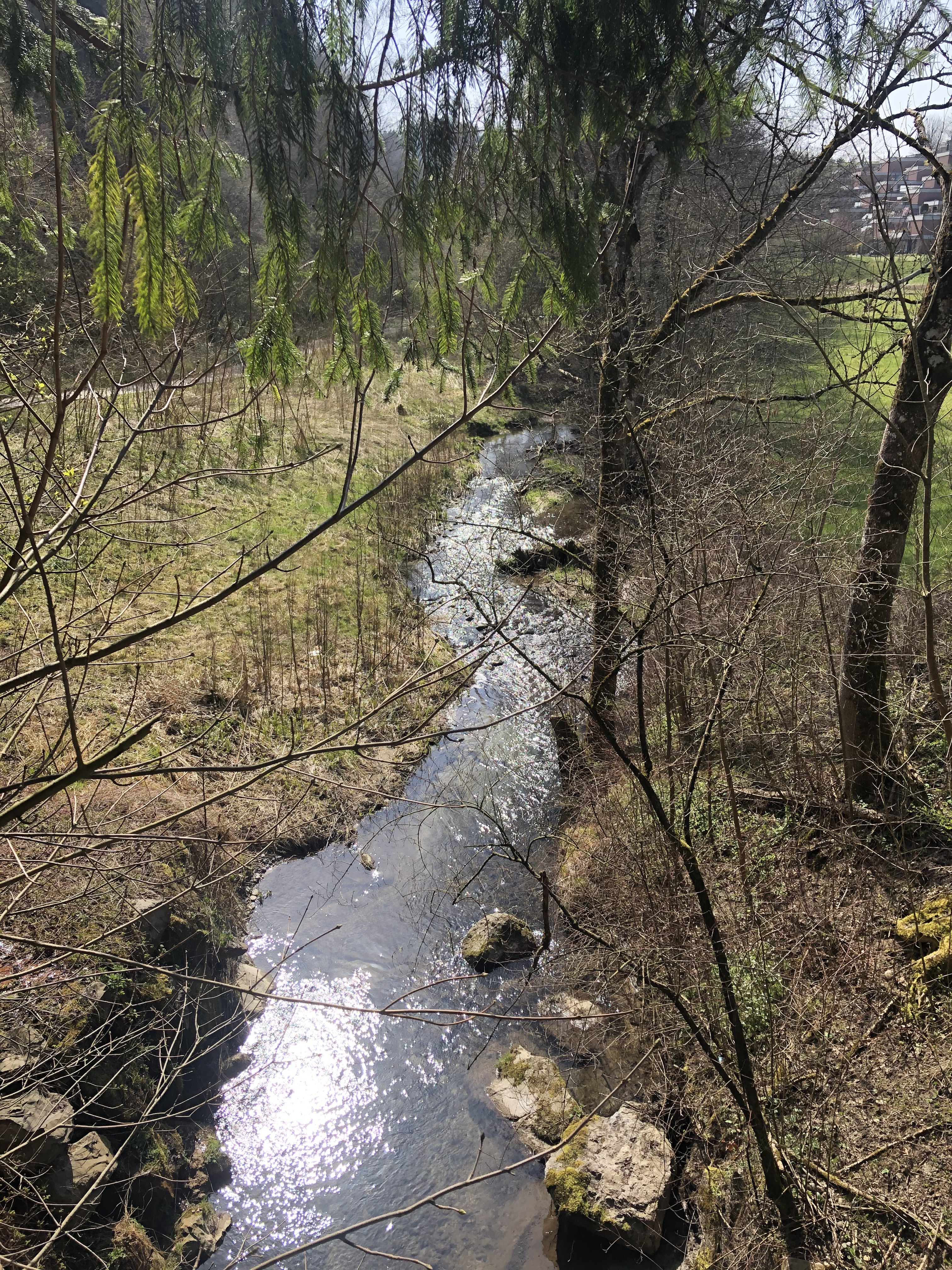 Blick auf den Gaebelbach von der Napoleonsbrücke